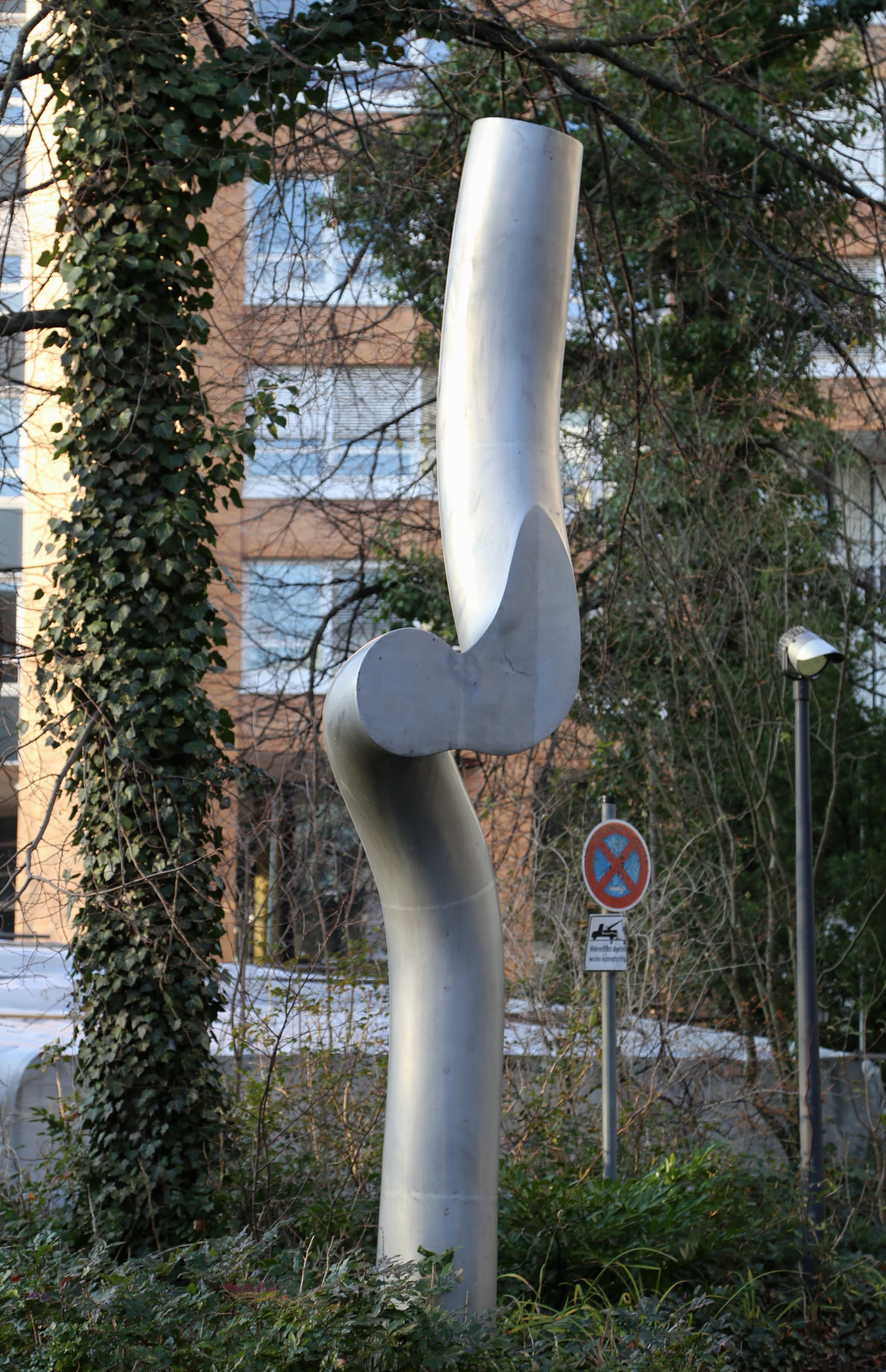 Chalamy kopto (1969), Aluminium, Arabellastraße, München